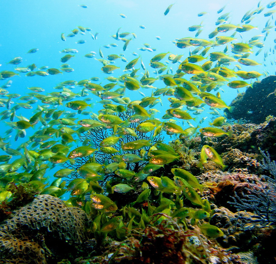 A school of juvenile fish of rabbitfish (Siganus fuscescens) in the south shore of Long-Dong Bay, a famous scuba diving site located at northeast coast of TAIWAN. This photo was taken by Vincent C. Chen on June. 8, 2013